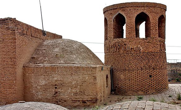 مناره مسجد میدان ساوه - شهریور ۱۳۹۲